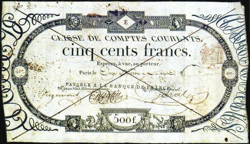 Papier de banque émis le 21 et 23 novembre 1800 après la fusion entre la Banque de France et la Caisse.